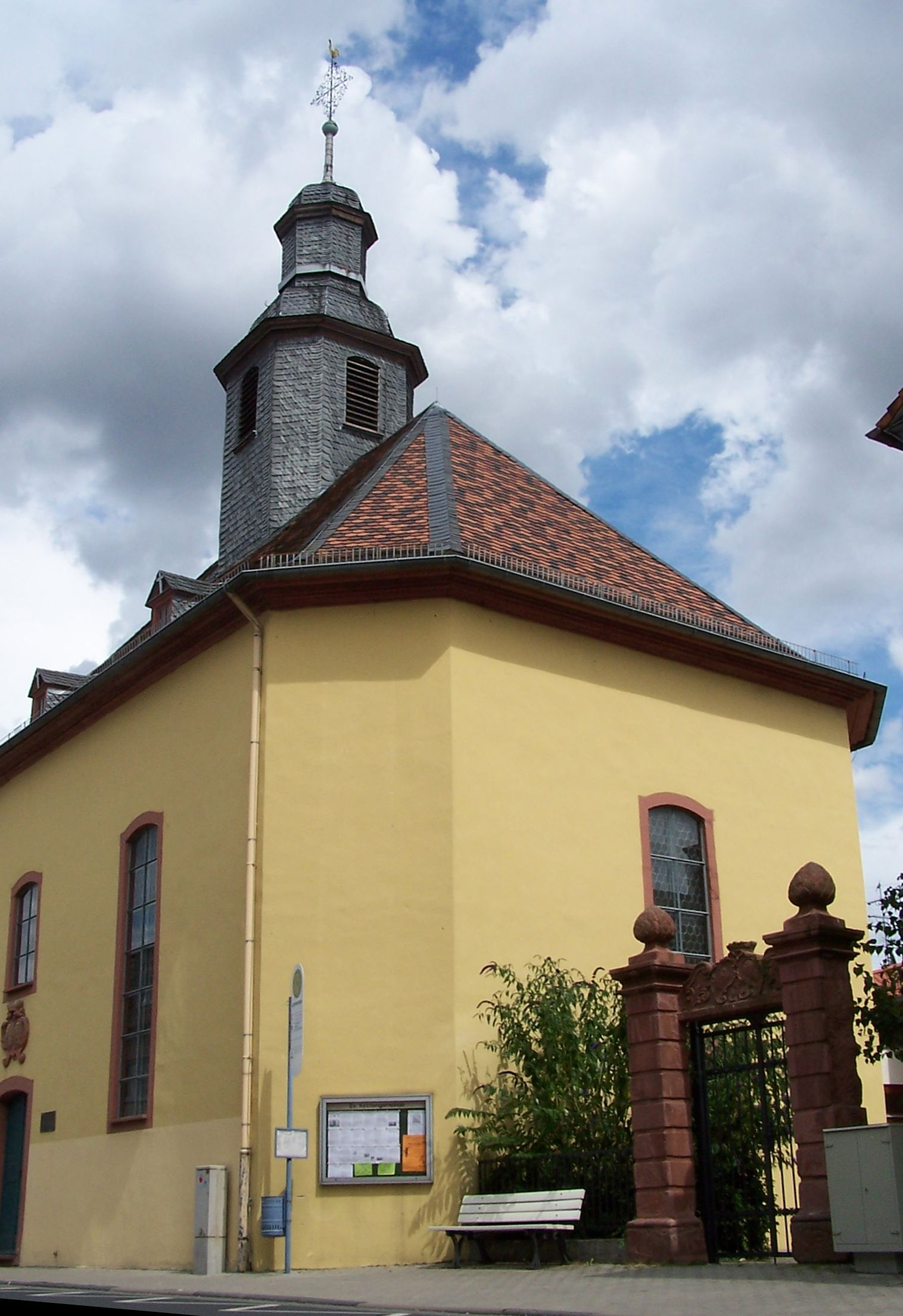 Evangelische Pfarrkirche Ober-Eschbach (Bad Homburg vor der Höhe). 1728 bis 1731 erbaut